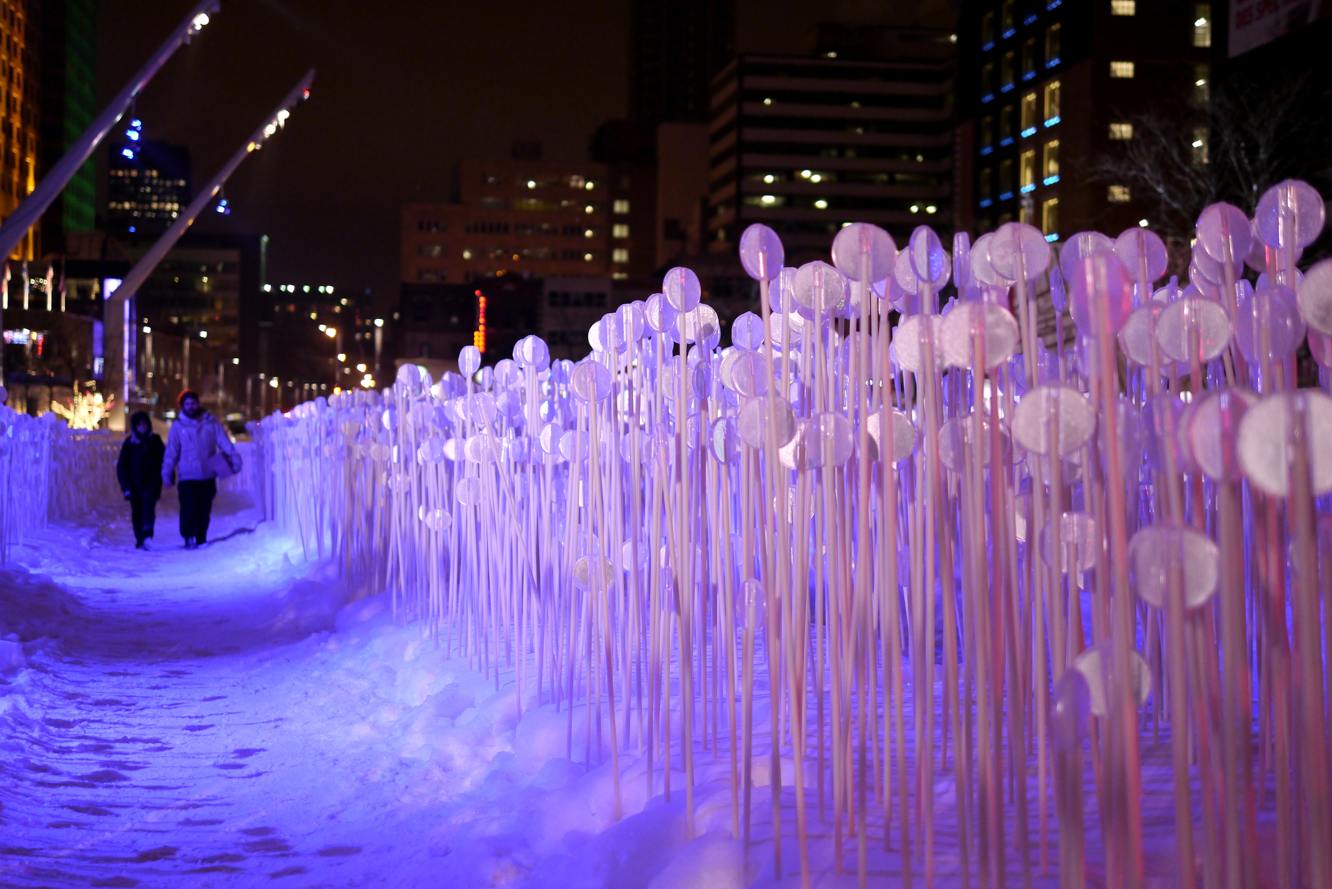 Place des festivals, Montréal Des milliers de tiges souples coiffées de réflecteurs blancs composent cette grande métaphore urbaine d’un champ de blé québécois. Les concepteurs se sont inspirés de la forme et du positionnement du « rang », ce mode de division des terres rurales instauré par le régime français en Nouvelle-France et qui a perduré jusqu'à ce jour. Sous l’effet du vent hivernal et de la réflexion de la lumière des projecteurs de la place des Festivals, ces épis stylisés oscillent en créant des effets de scintillement qui reproduisent les ondulations blondissantes du blé dans la campagne. Ce clin d’œil aux origines du Québec établit un dialogue original entre l’histoire agricole de la province et sa réalité urbaine actuelle. Par un jeu de symboles, il crée aussi un lien entre les saisons, installant l’été céréalier au cœur de l’hiver. Le visiteur se promène ainsi dans un espace intemporel, entre deux âges et deux saisons. Des sources musicales dispersées dans l’espace et synchronisées donnent le sentiment de mélodies qui se déplacent, comme le bruit du vent dans les blés. Par ailleurs, l’implantation des tiges métaphoriques de l’installation ouvre des sentiers qui invitent le public à une promenade bucolique multisensorielle au cœur de Montréal. Fondée en 2003, Kanva est une firme d’architecture multidisciplinaire qui combine conception architecturale, projets immobiliers et installations artistiques. Pour elle, chaque projet est l’occasion de raconter une histoire, d’améliorer l’environnement bâti et d’élargir la pratique de l’architecture et de l’art. Kanva est lauréate de plusieurs prix et a réalisé plusieurs expositions (Institut Royal d’Architecture du Canada, Grands Prix du design, Jardins de Métis, Centre Canadien d’Architecture, Maison de l’architecture du Québec, Société des arts technologiques…).